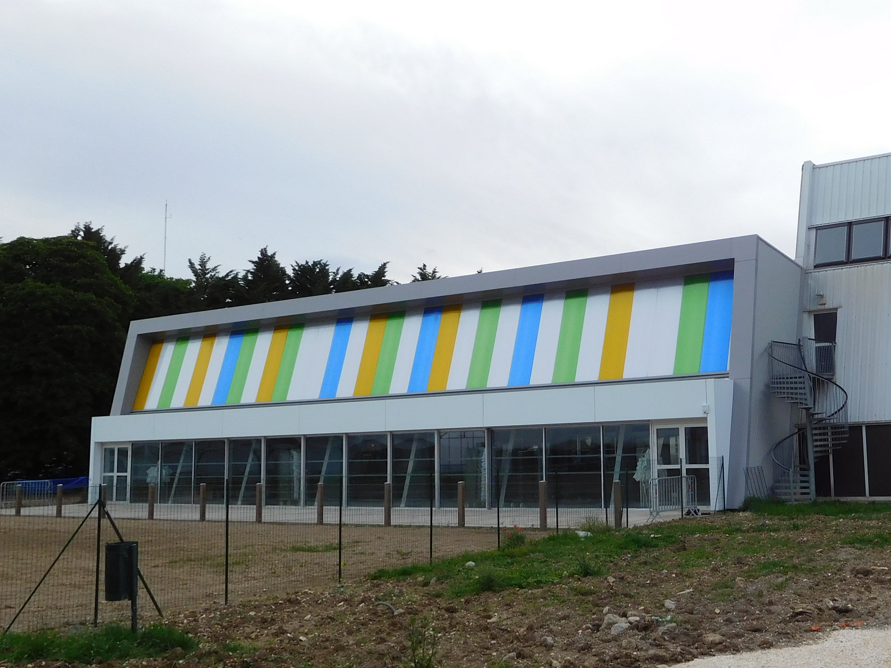 Façade de la piscine intercommunale Saint-Laurent. Piscine rénovée, inaugurée le 26 mai 2018 en présence de Fabien Gilot. Appartient à la communauté de communes Loire, Vignobles et Nohain. Rue du Colonel-Rabier, Cosne-Cours-sur-Loire.